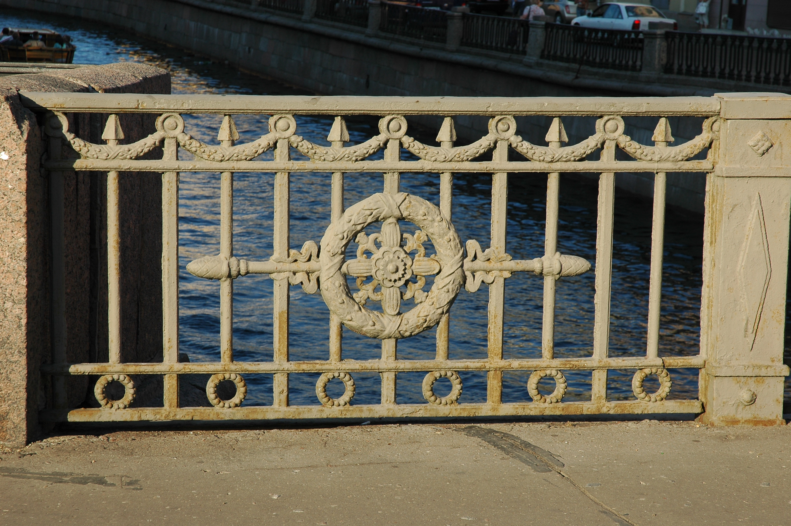 Kokushkin bridge (fence), Griboedov canal (St Petersburg)